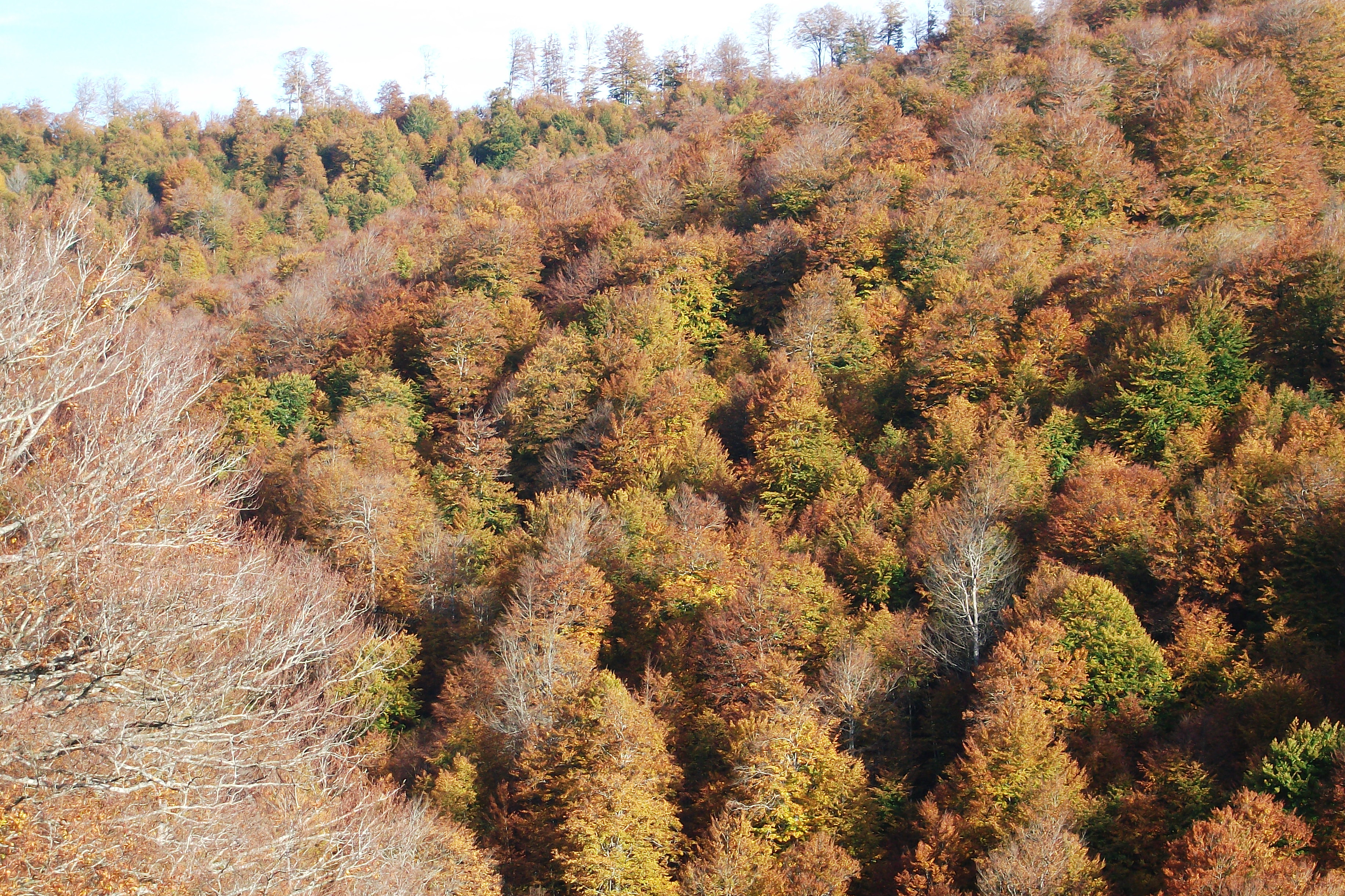 Hayedo de Irati, poco antes de la caída de hoja